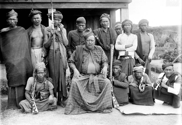 Negatief. De Bataks waren berucht vanwege hun reputatie als 'menseneters', wat er, naast de geïsoleerde ligging van het Batakgebied voor zorgde dat buitenstaanders zich niet in het gebied waagden. De meerderheid van de Bataks was niet Moslim, zodat de zendeling hier z'n geluk beproefde. Mocht dit voor individuele zendelingen weleens verkeerd aflopen, het eindresultaat was dat een flink percentage van de Bataks gekerstend werd en nog steeds Christen is. Simoloengoen werd voor het eerst in 1865 door Europeanen bezocht. Tussen 1889 en 1904 werd het gebied onderworpen, zij het dat de inheemse hoofden (raja) 'zelfbestuurders' werden. Let vooral op de fraaie wapens op de foto. (P. Boomgaard, 2001). De Raja van Dolok met zijn gevolg, Simeloengoen